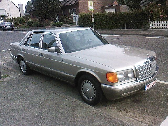 Mercedes Benz 260 SE W 126 Baujahr 1989 09.11.2007 Thomas Ernst